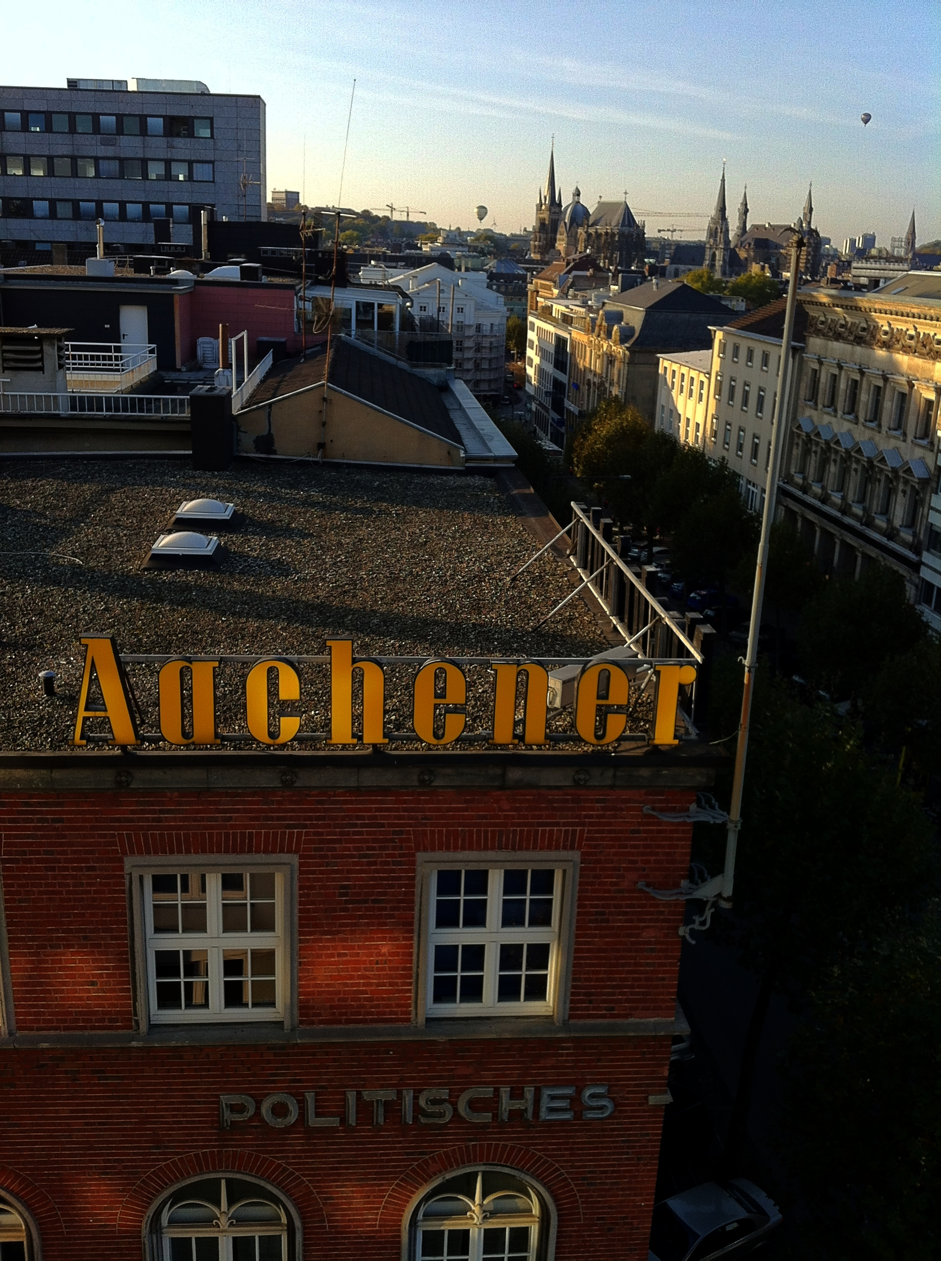 Blick auf die Theaterstrasse mit dem ehemaligen Verlagshaus der Aachener Nachrichten (früher Politisches Tageblatt). Im Hintergrund: Aachener Dom und Rathaus